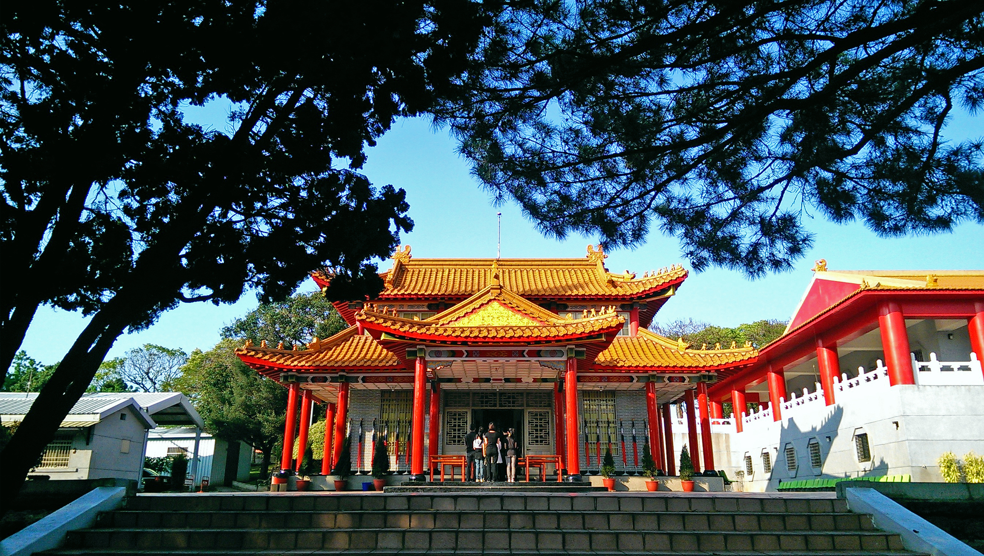 中文（台灣）: 國軍彰化忠靈塔